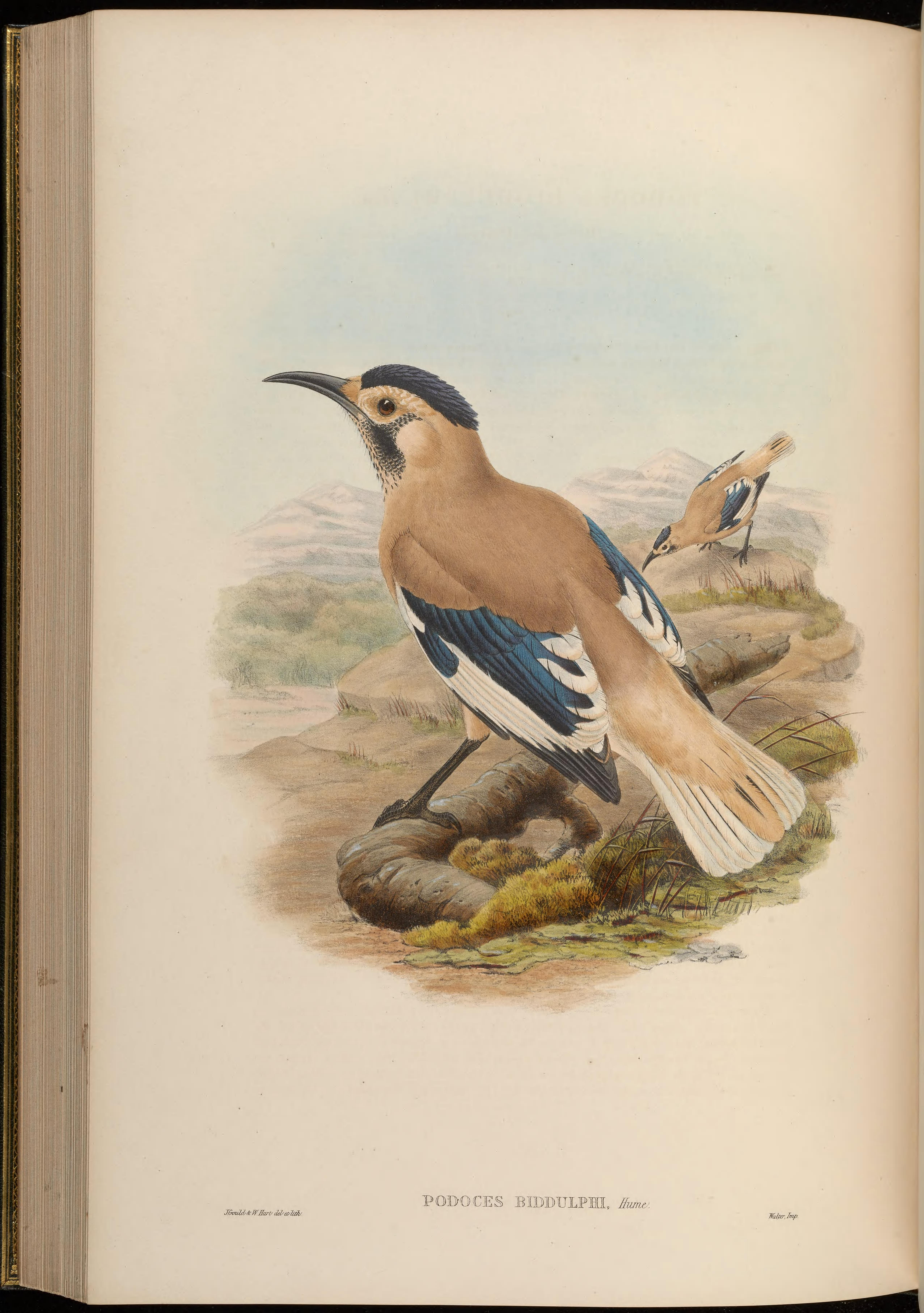 Podoces biddulphi